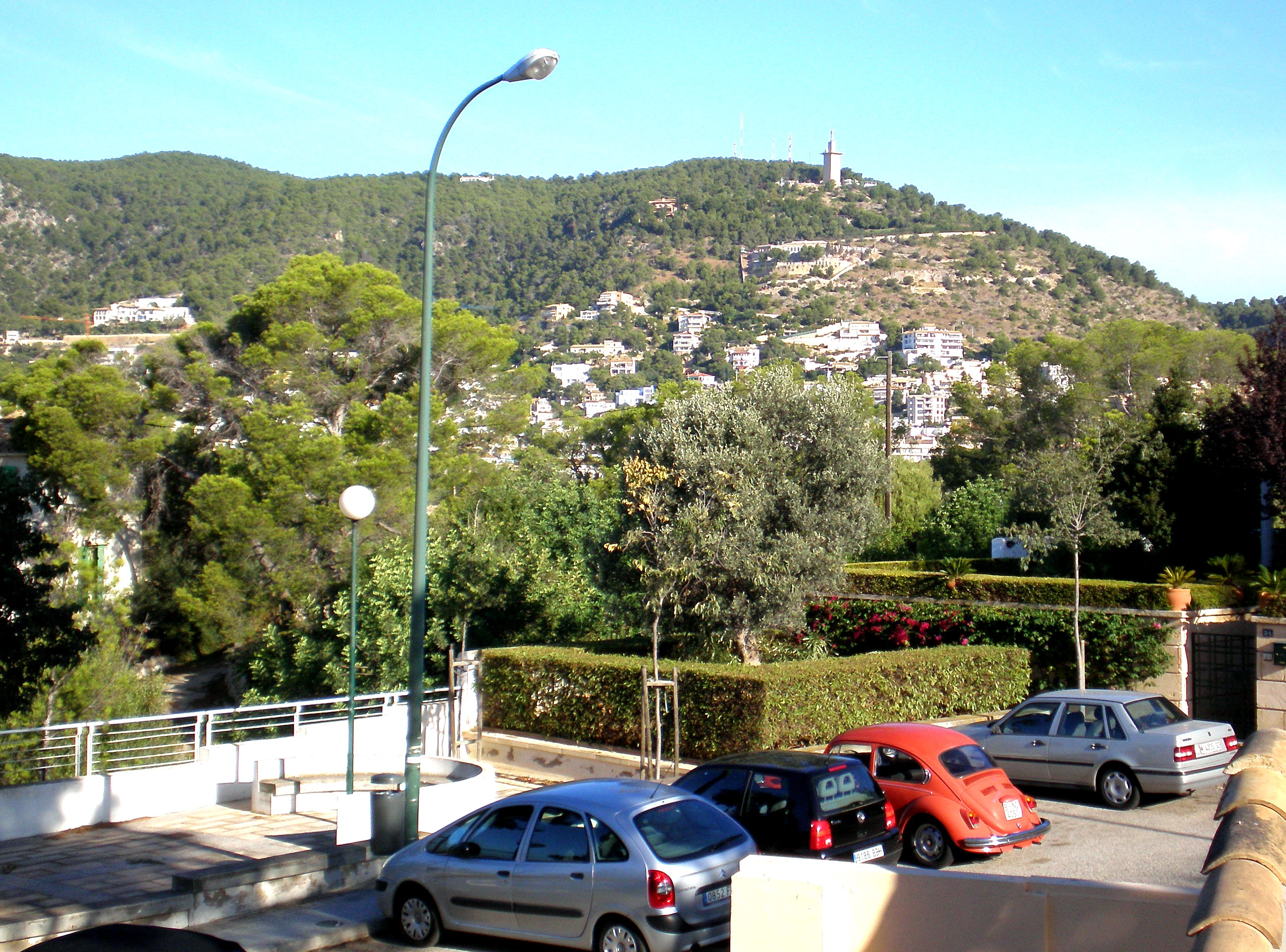 Mallorca - La Sierra de Na Burguesa en Palma vista desde Villa Argentina